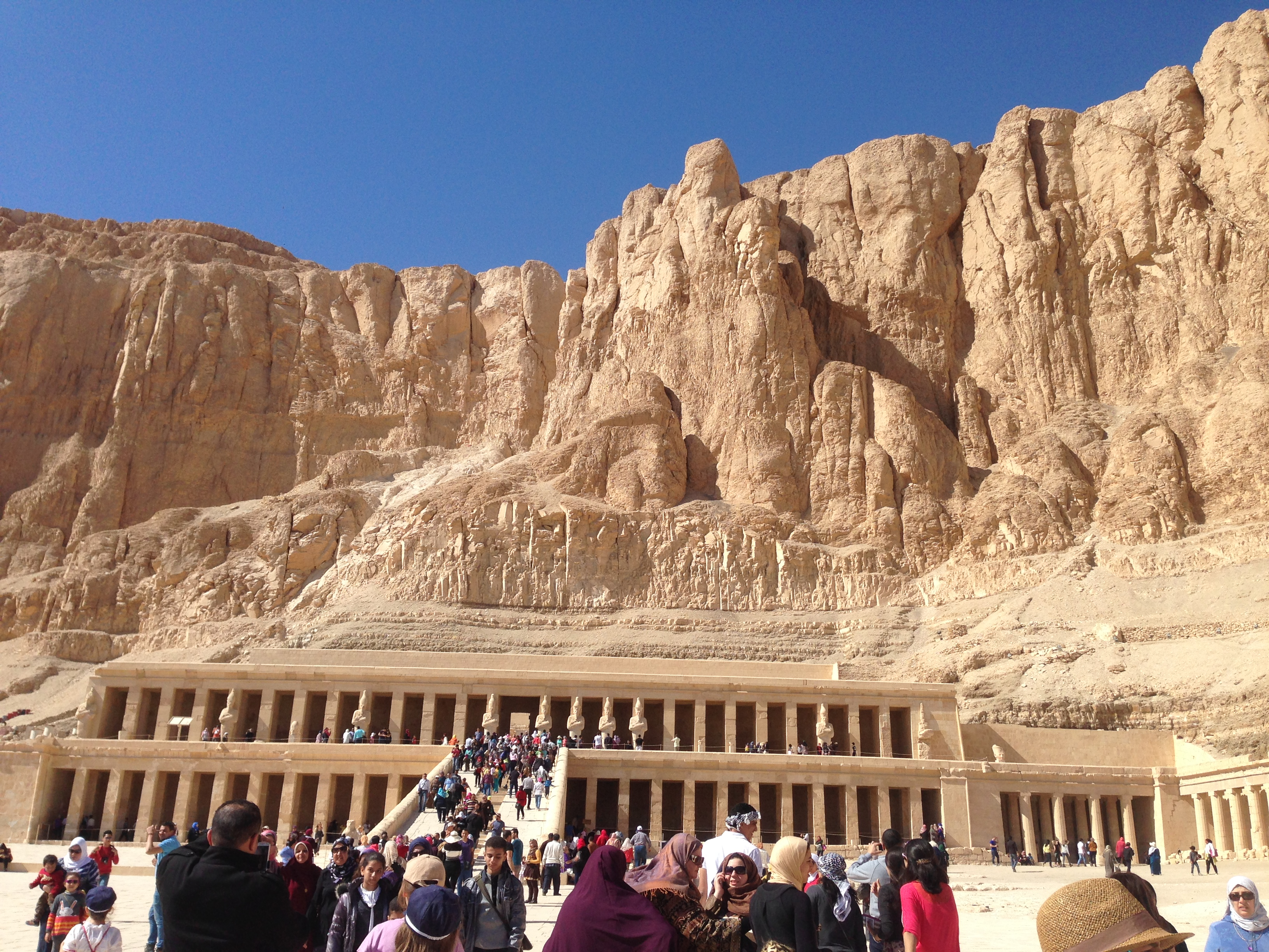 Splendid